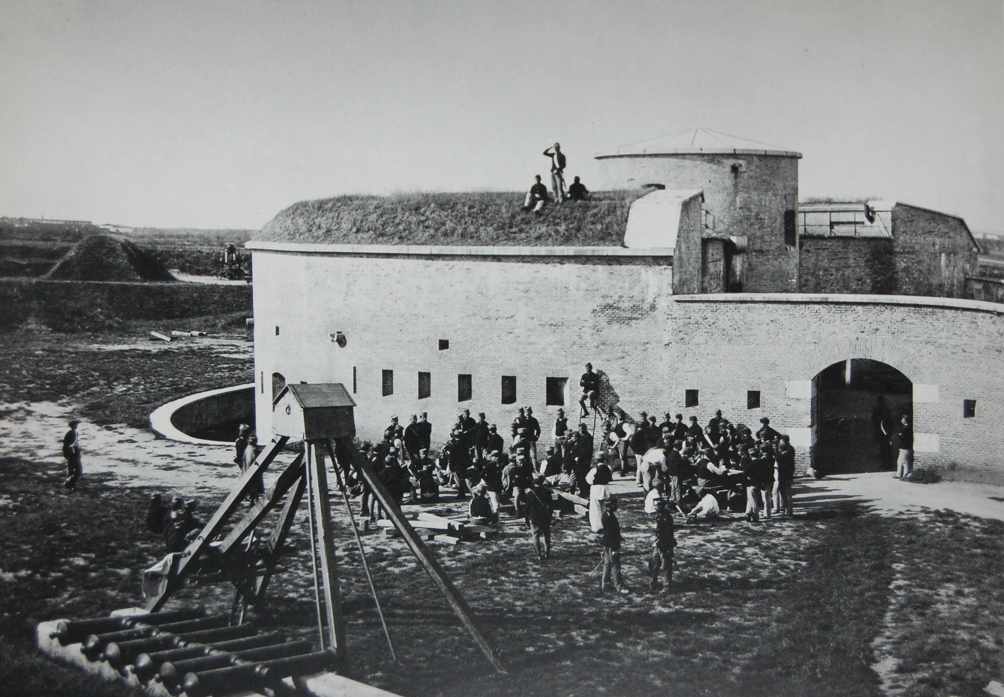 Il Forte Santa Caterina, parte della fortezza austroungarica di Verona, nel 1863. Foto di Moritz Lotze (1809-1890).